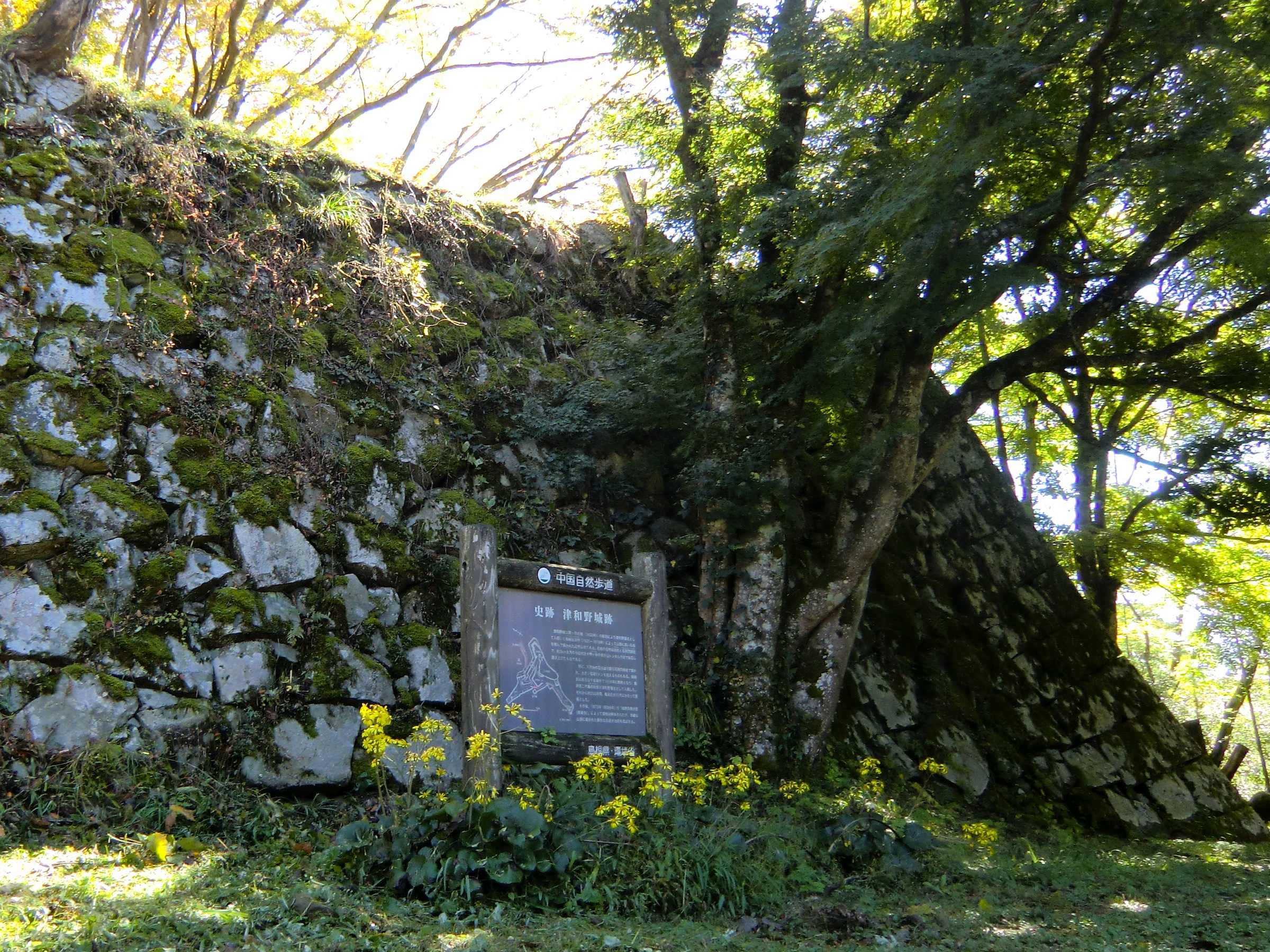 津和野城（津和野町）の天守台の石垣。案内板の下に咲いているのは「津和野」の由来となったツワブキ。